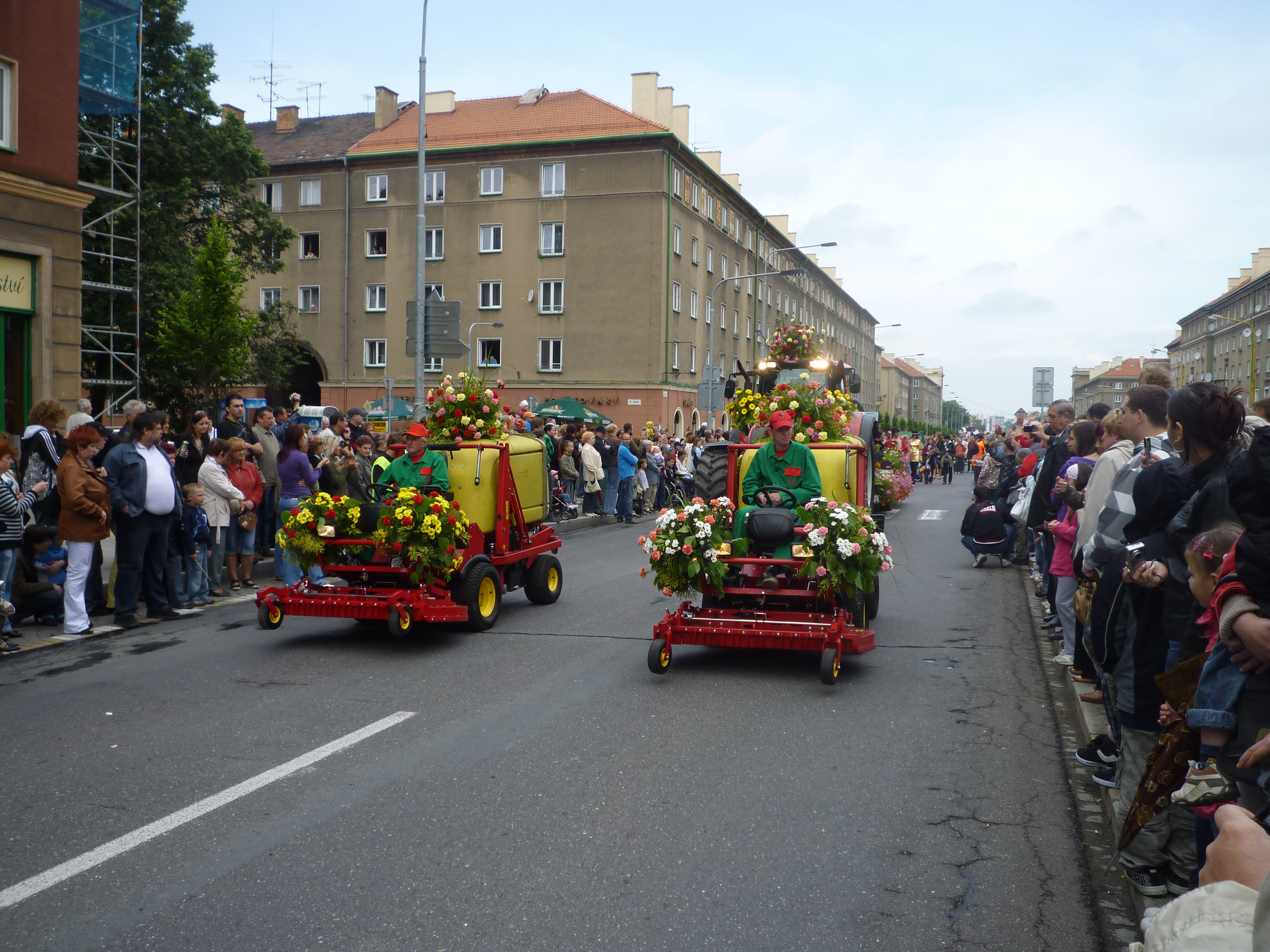 Alegorické multikáry na Hlavní třídě (Havířov v květech 2010)